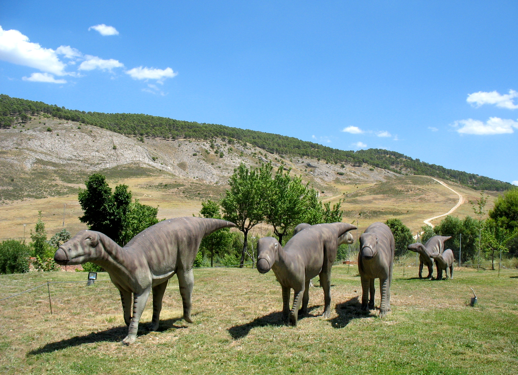 Figuras de Iguanodon bernissartensis - Museo Paleontológico de Castilla-La Mancha (Cuenca)